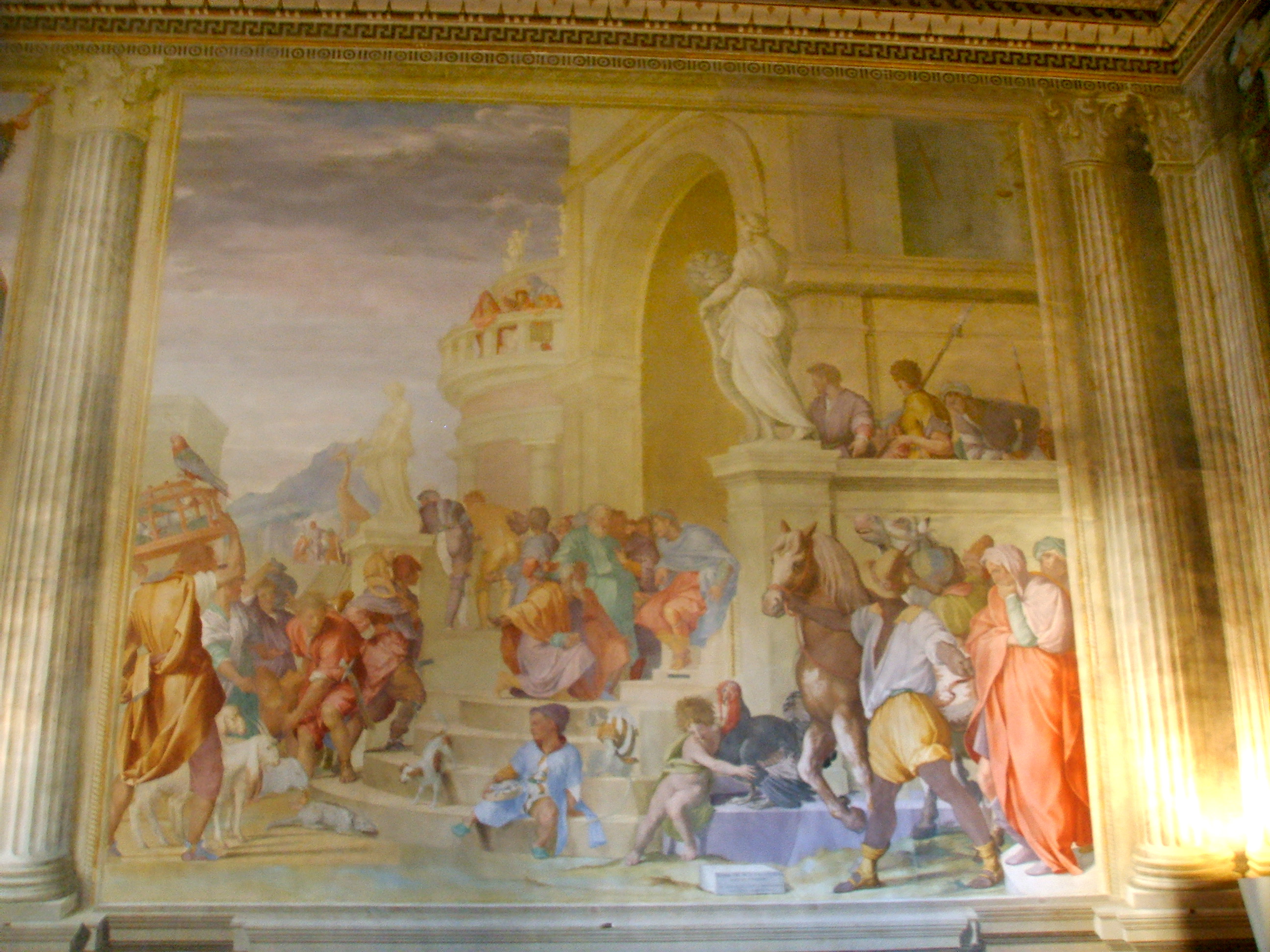 Alessandro Allori, Siface di Numidia che riceve Scipione. Villa medicea di Poggio a Caiano, inside. Sala di Leone X.